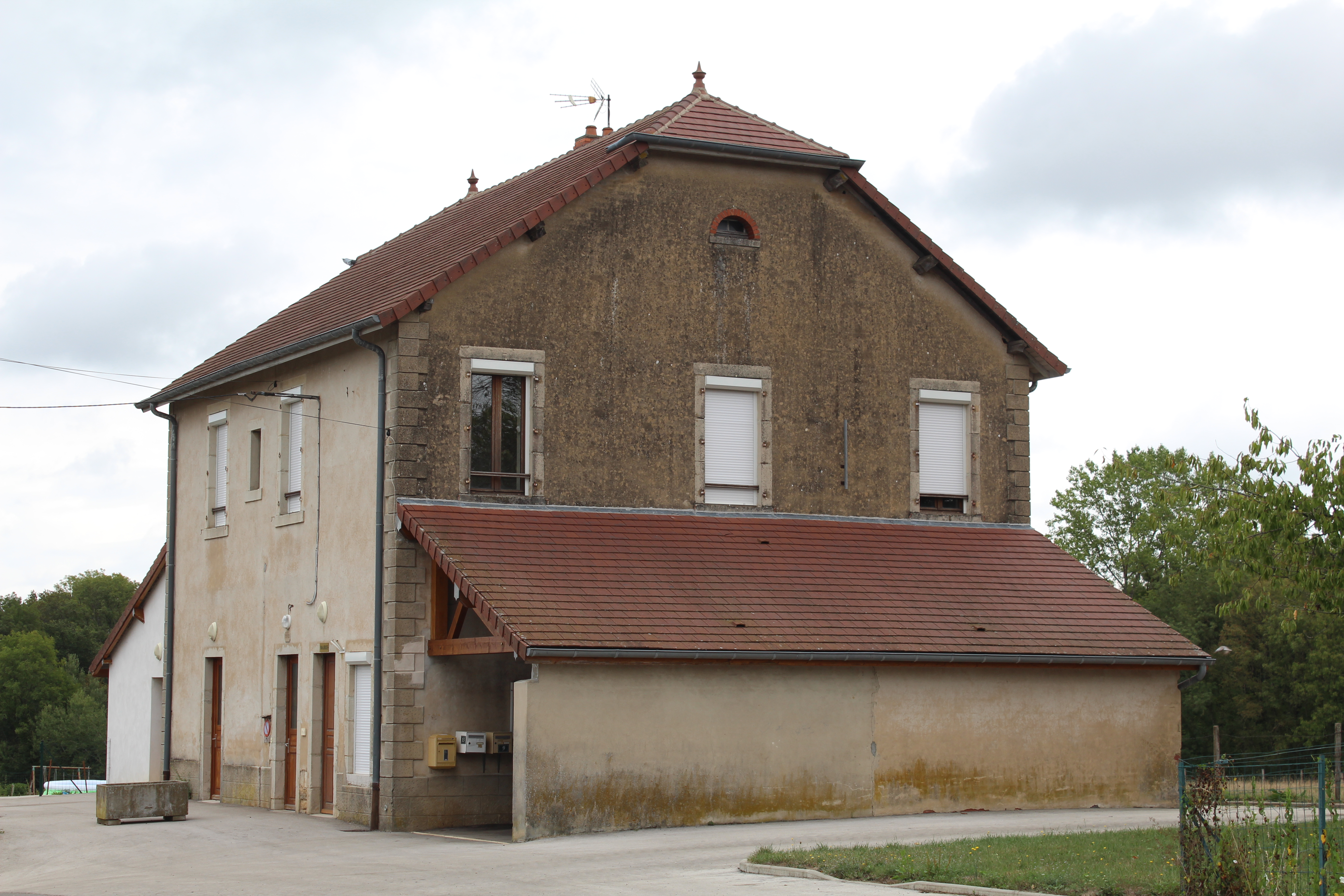 Mairie de Chêne-Sec.